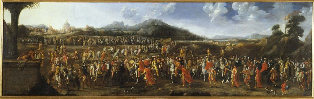 Wjazd Jerzego Ossolińskiego do Rzymu